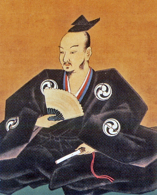 別所長治。戦国時代の大名。東播磨、三木城主。